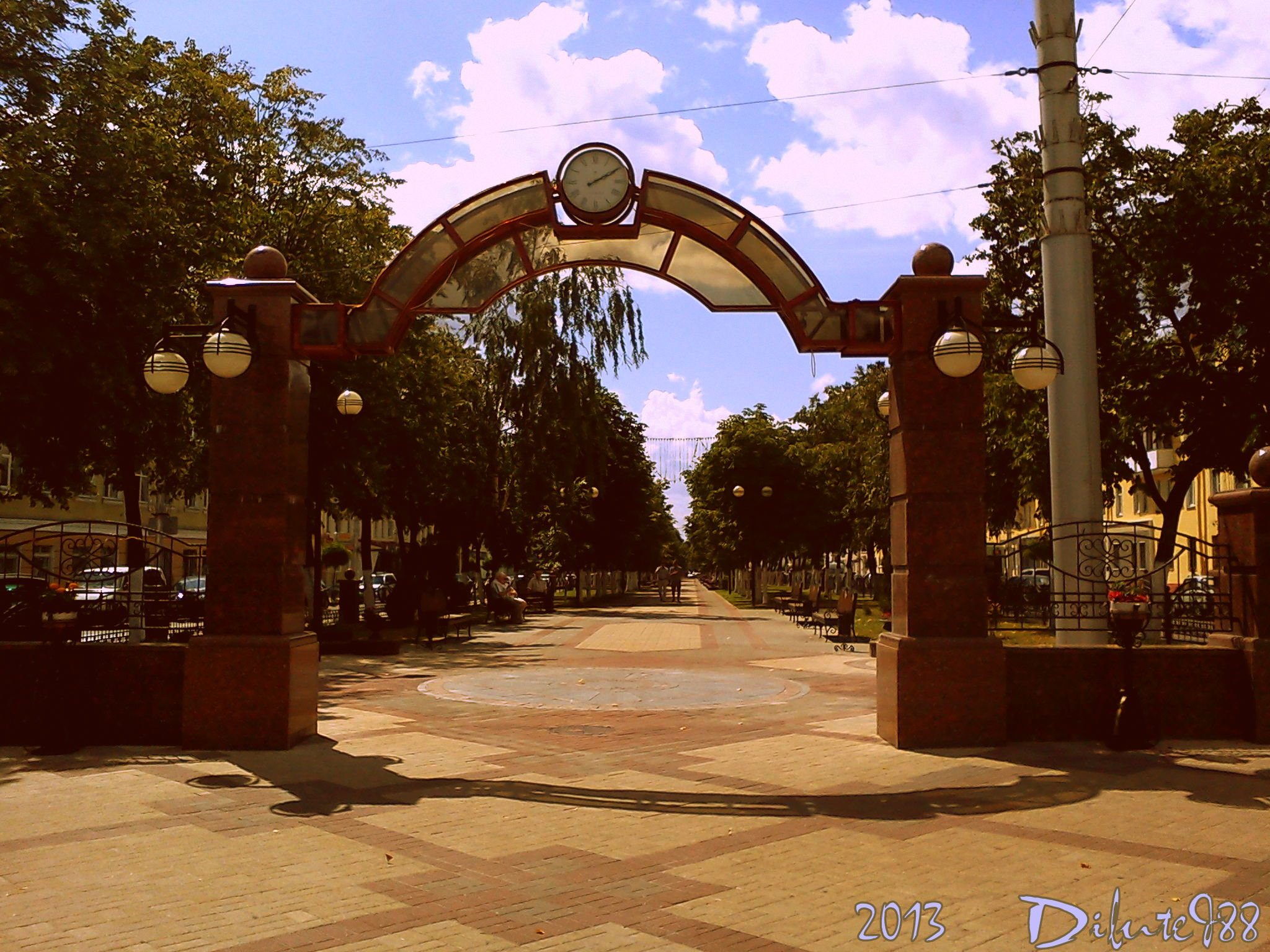 Самые точные часы в Гомеле, находятся на стыке двух улиц - Советская и Победы